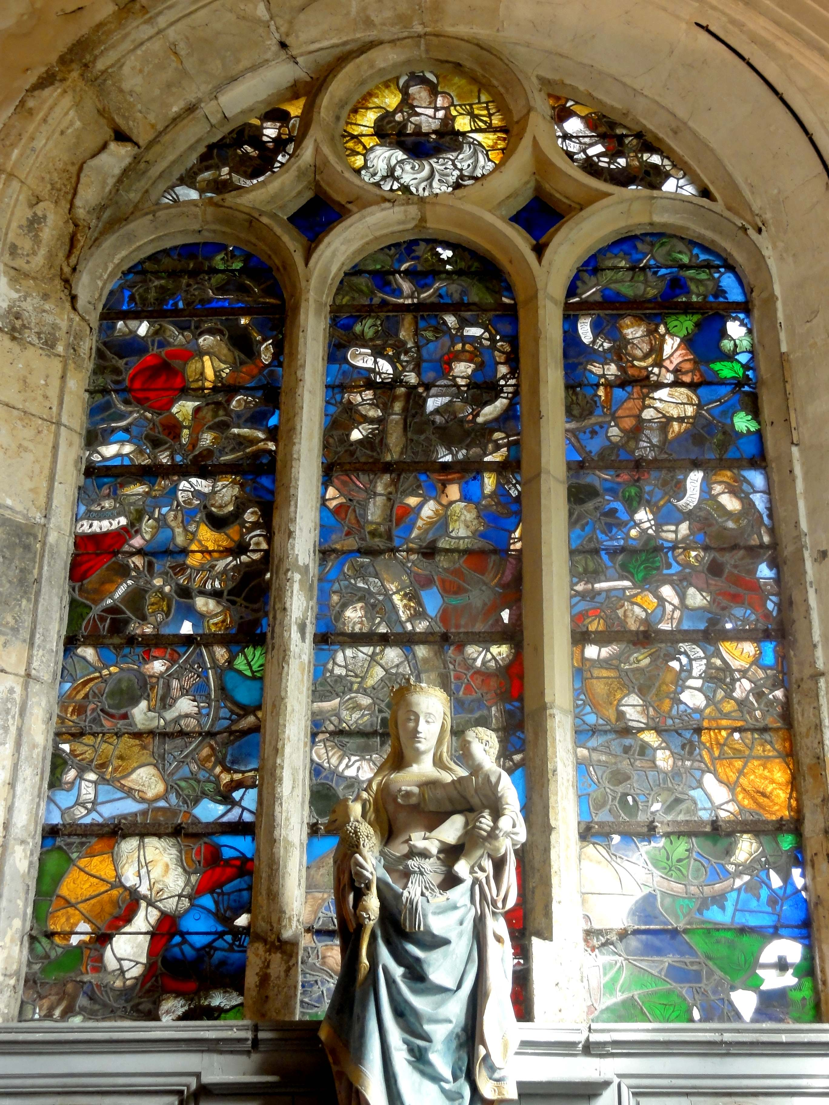 Verrière de l'arbre de Jessé.